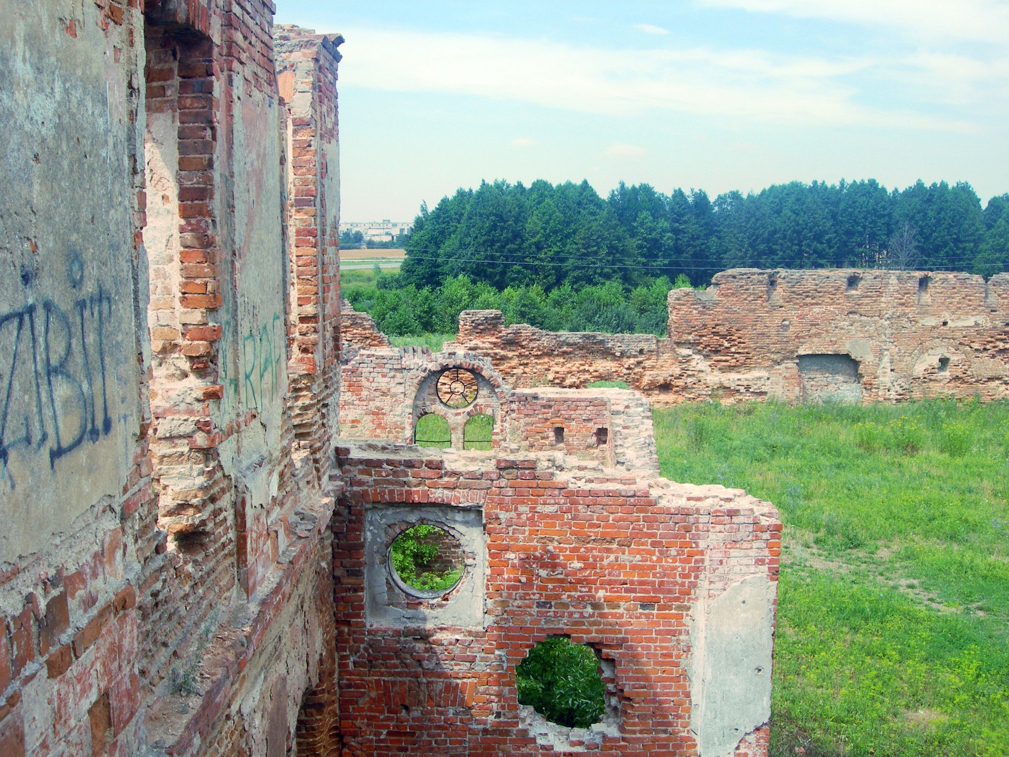 Biaroza monastery ruins